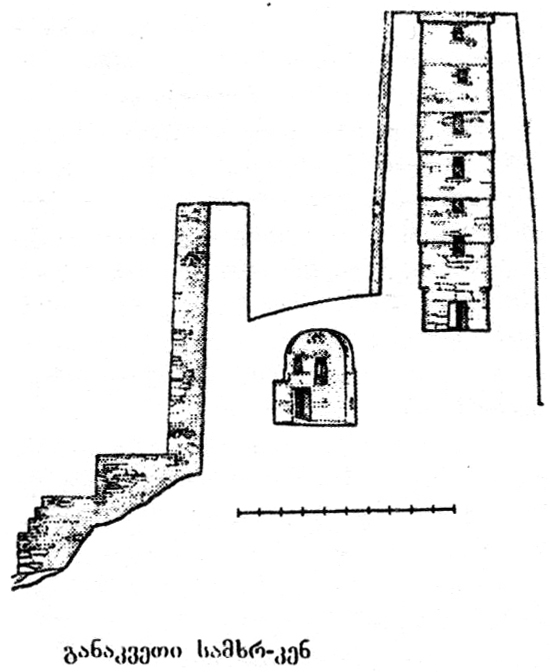 მერეს ციხის ჭრილი